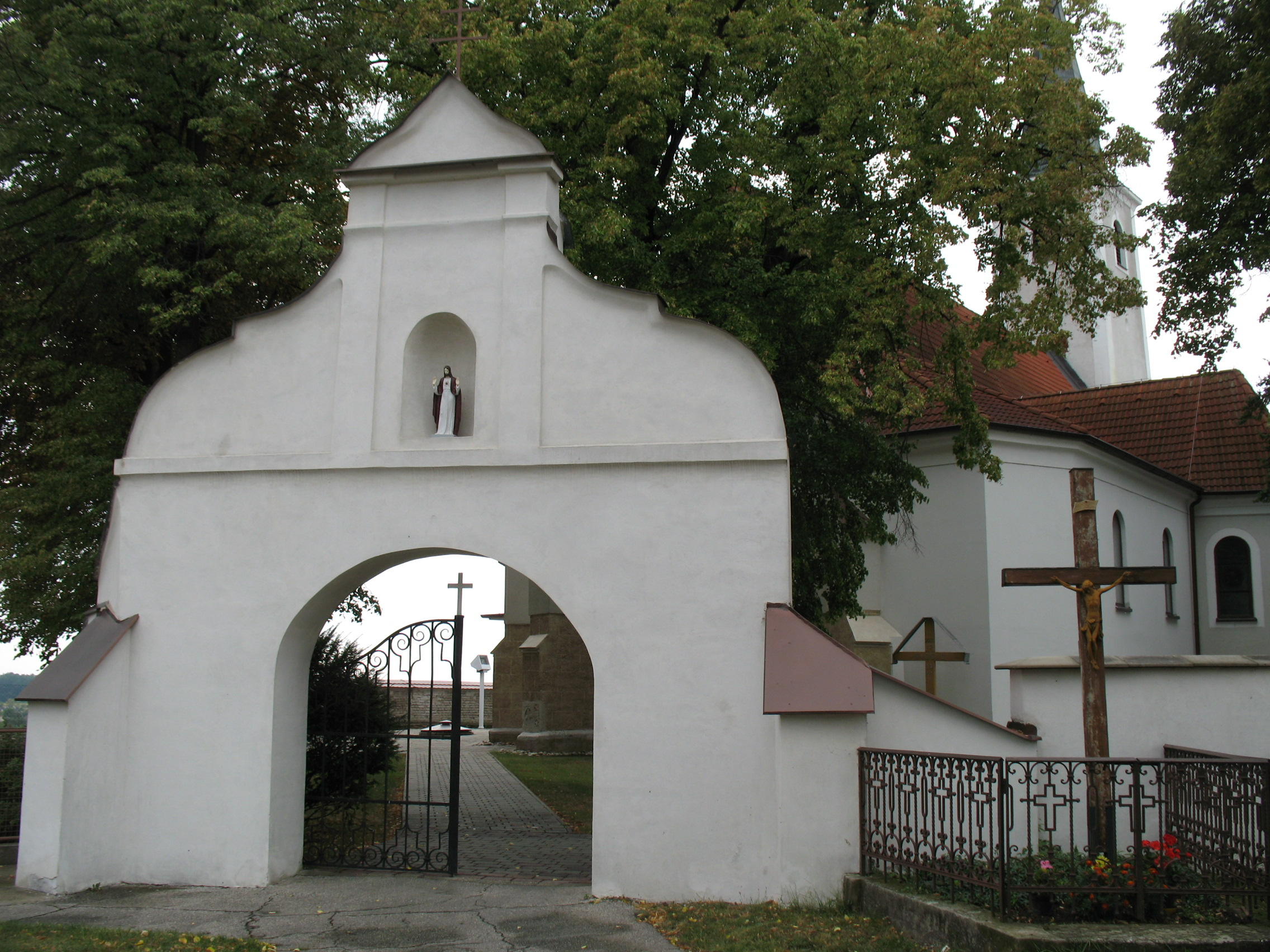 templomkert kapu